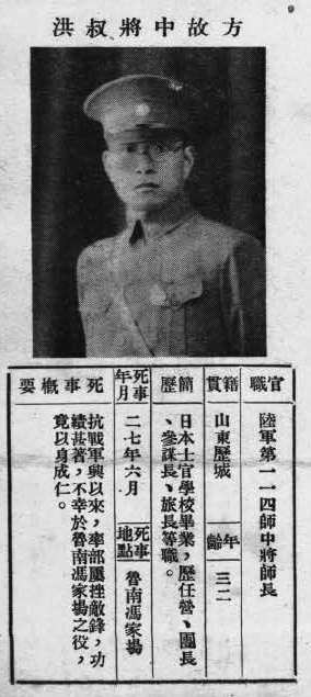 中文（台灣）: 抗戰軍人忠烈錄第一輯中的烈士遺像